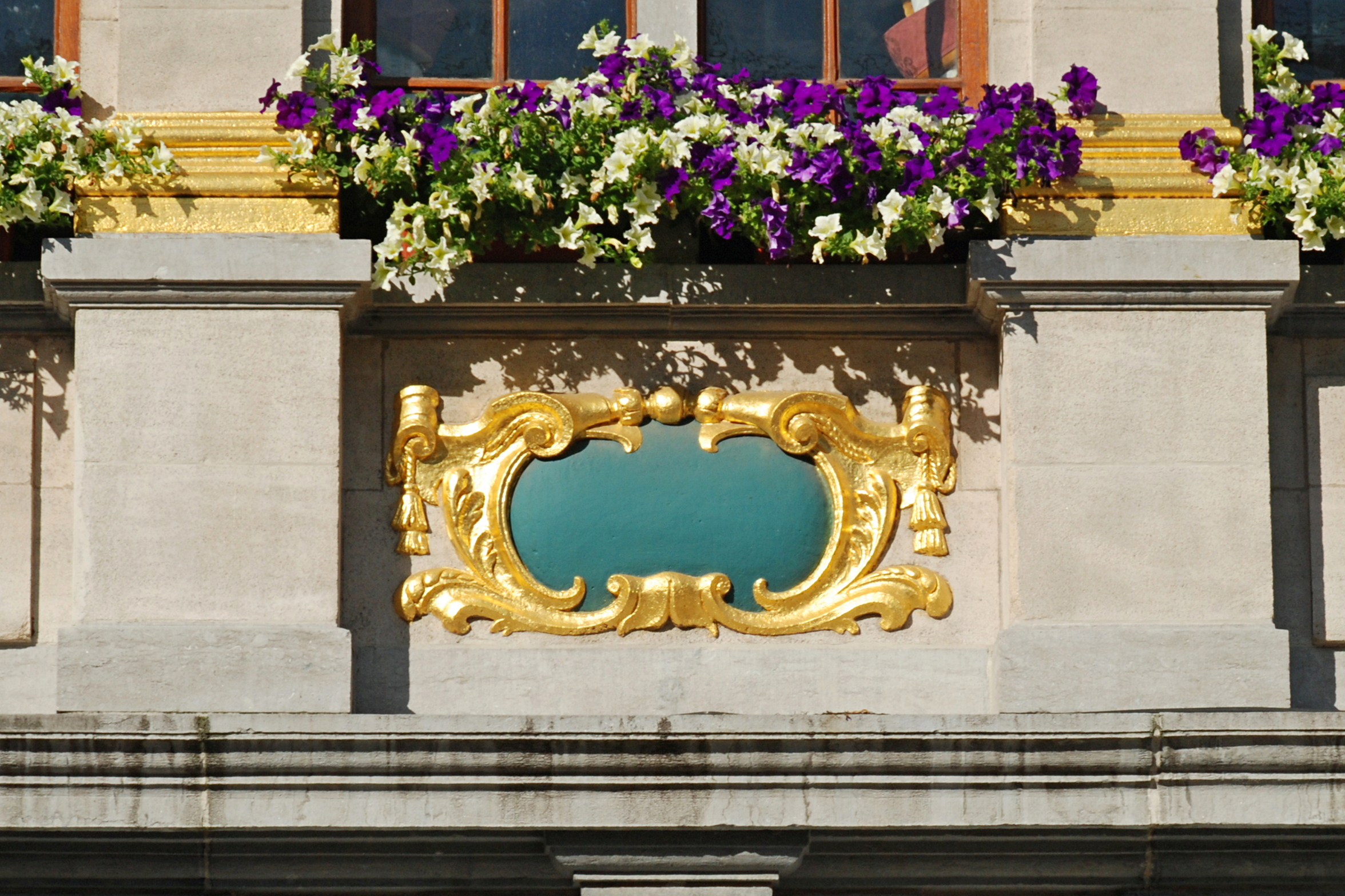 Belgique - Bruxelles - Grand-Place n°8 - Maison de l'Étoile